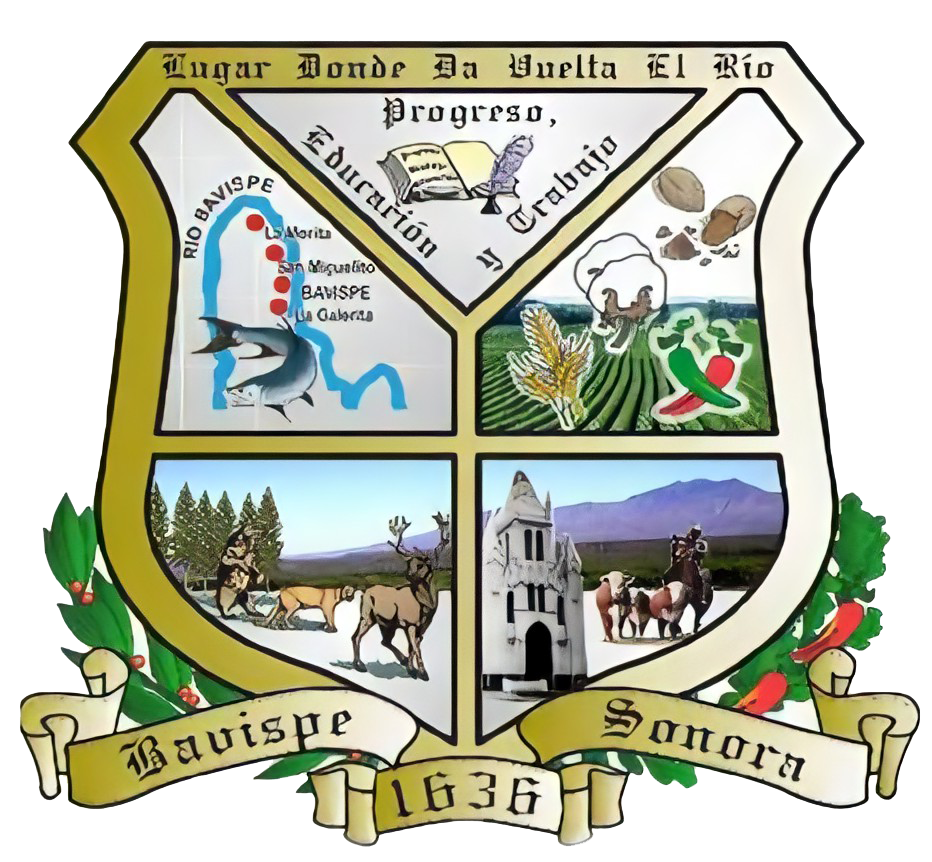 Escudo de Bavispe, Sonora, México.